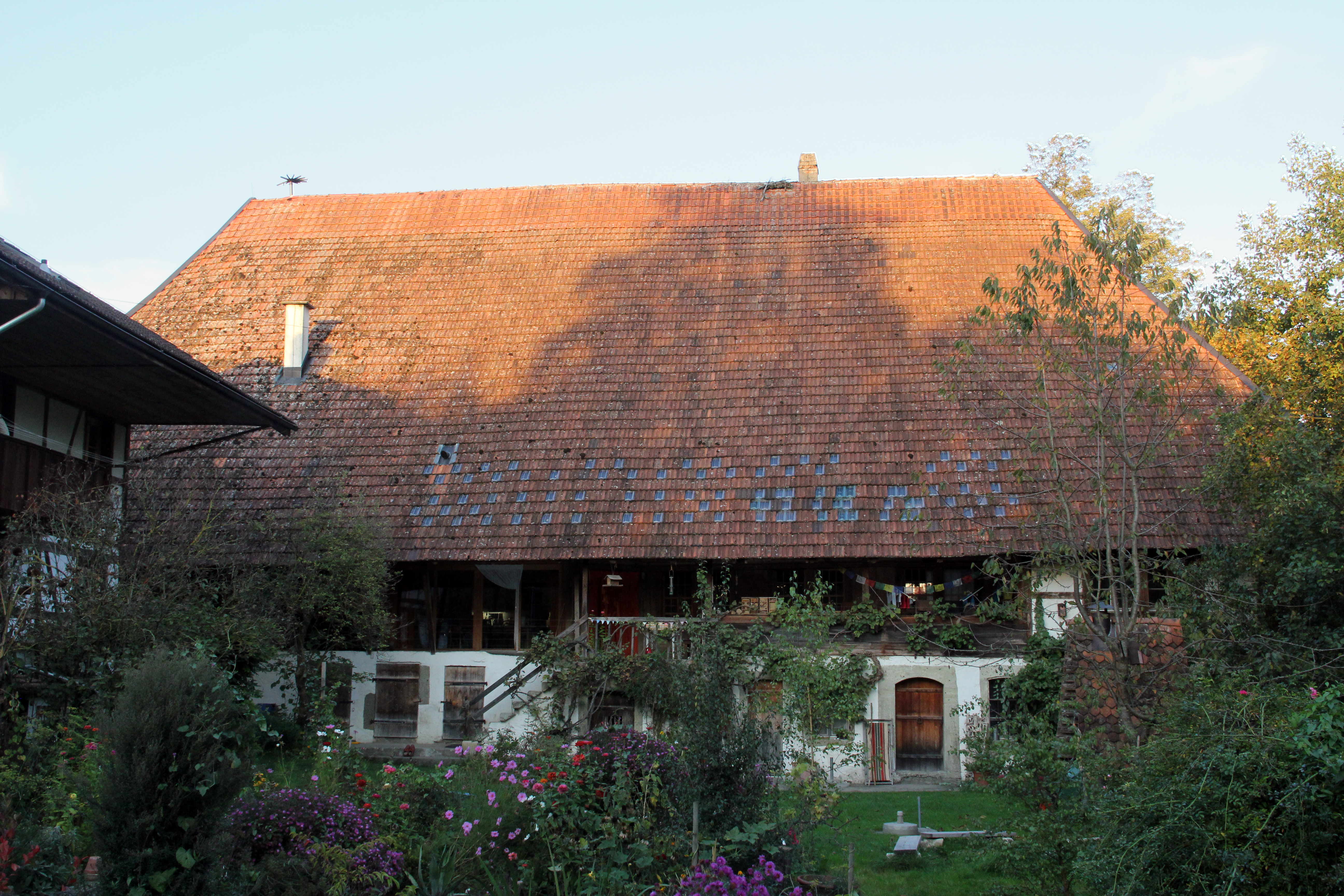 Vollansicht des Wohnhauses der Mühle Dotzigen.